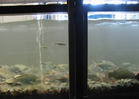 Ethohydraulik